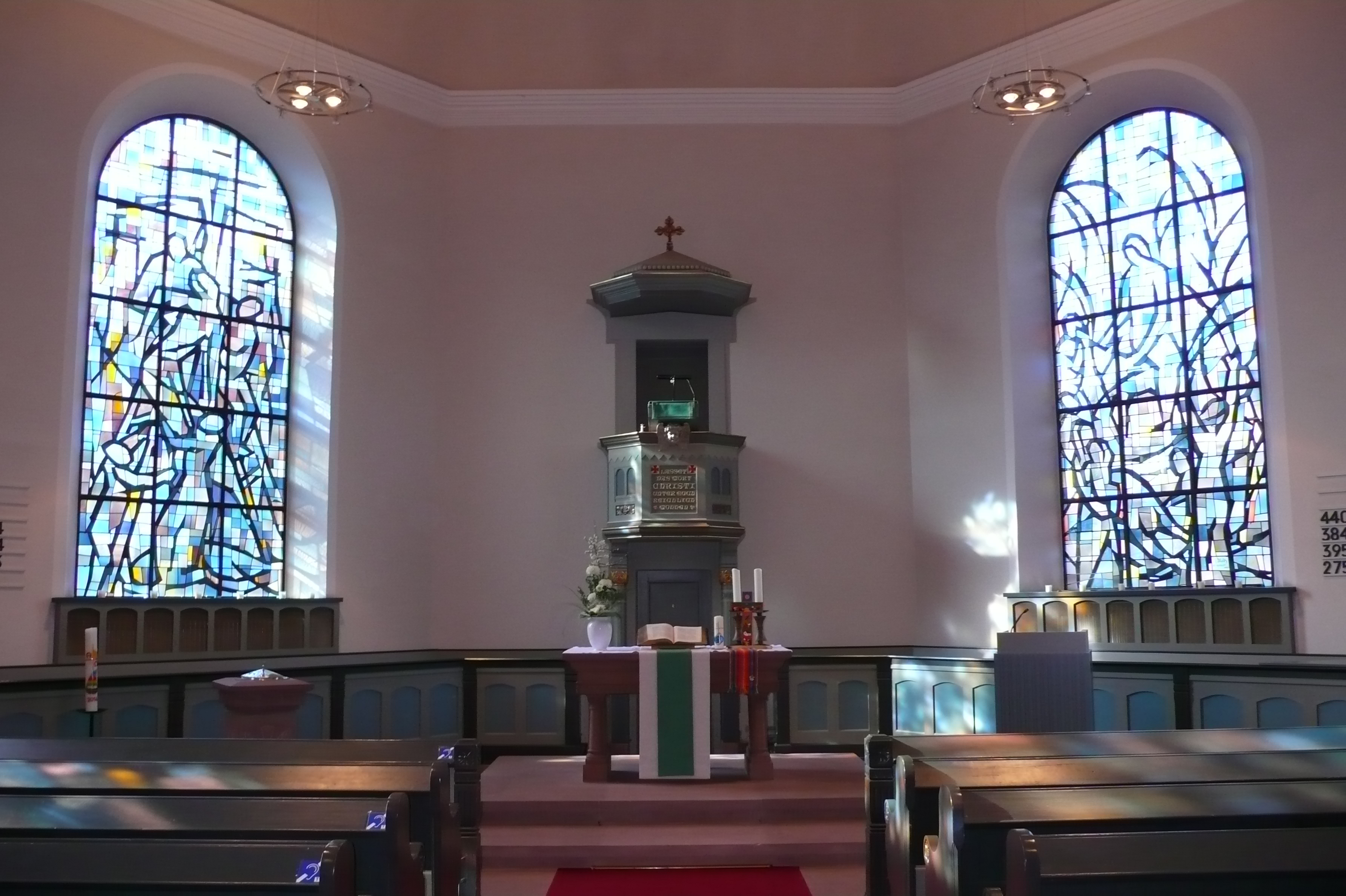 Evangelische Melanchthonkirche in Frankfurt-Fechenheim, barocke Kirche von 1772, Altarraum